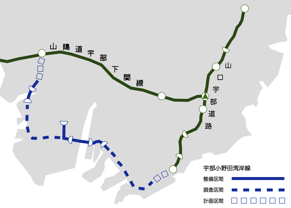 宇部小野田湾岸線およびその周辺